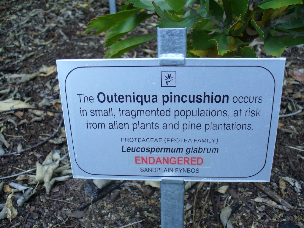 Leucospermum glabrum, sign